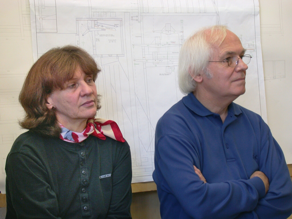 Johannes und Elisabeth Rohlf, Orgelbau Neubulach, Landkreis Calw, Baden-Württemberg, Deutschland